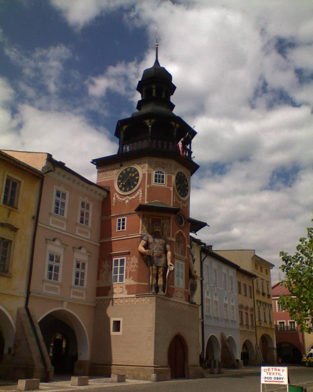 Náměstí v Hostinném v okrese Trutnov - radnice